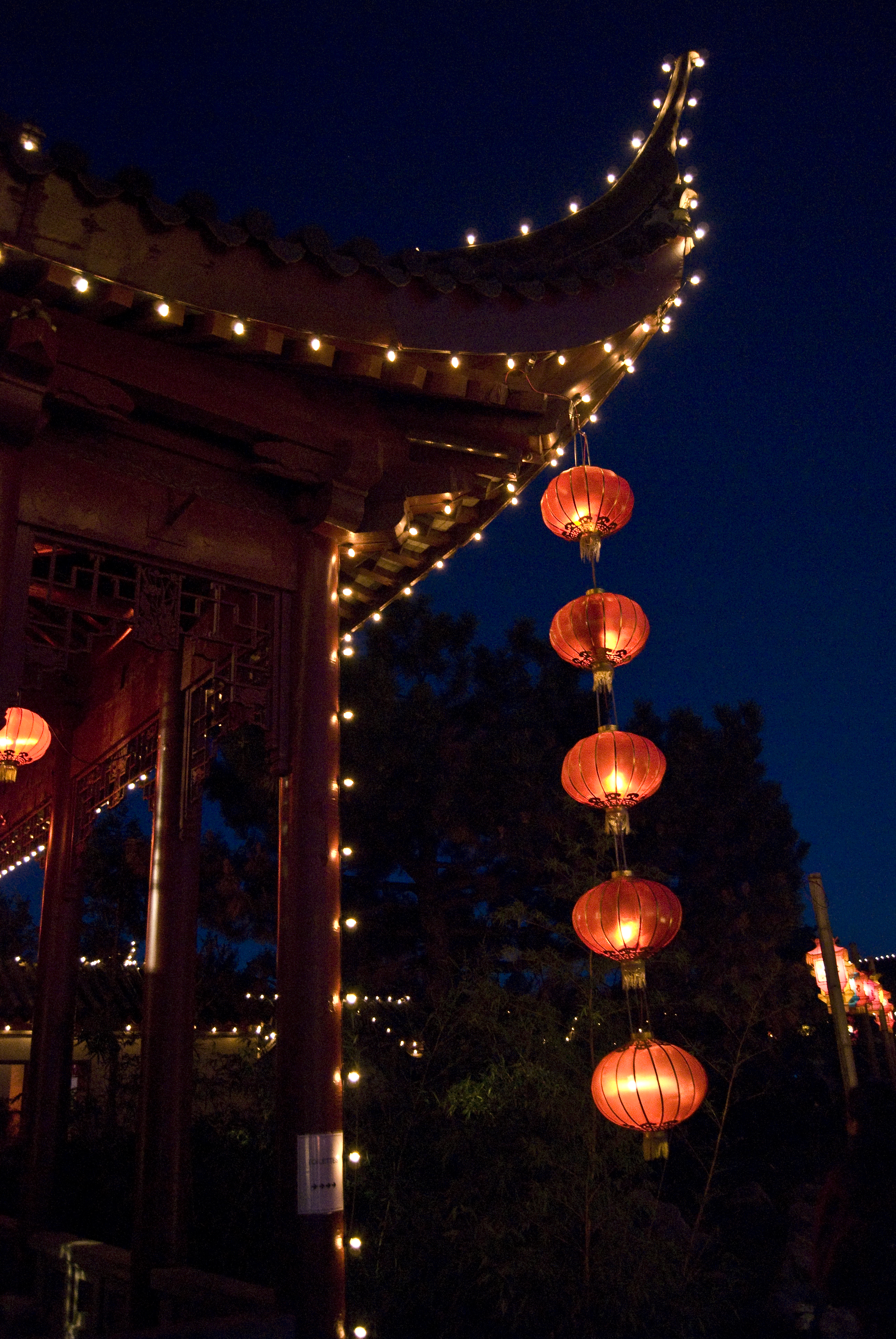 Photo prise à La magie des lanternes, Jardin de Chine du Jardin botanique de Montréal